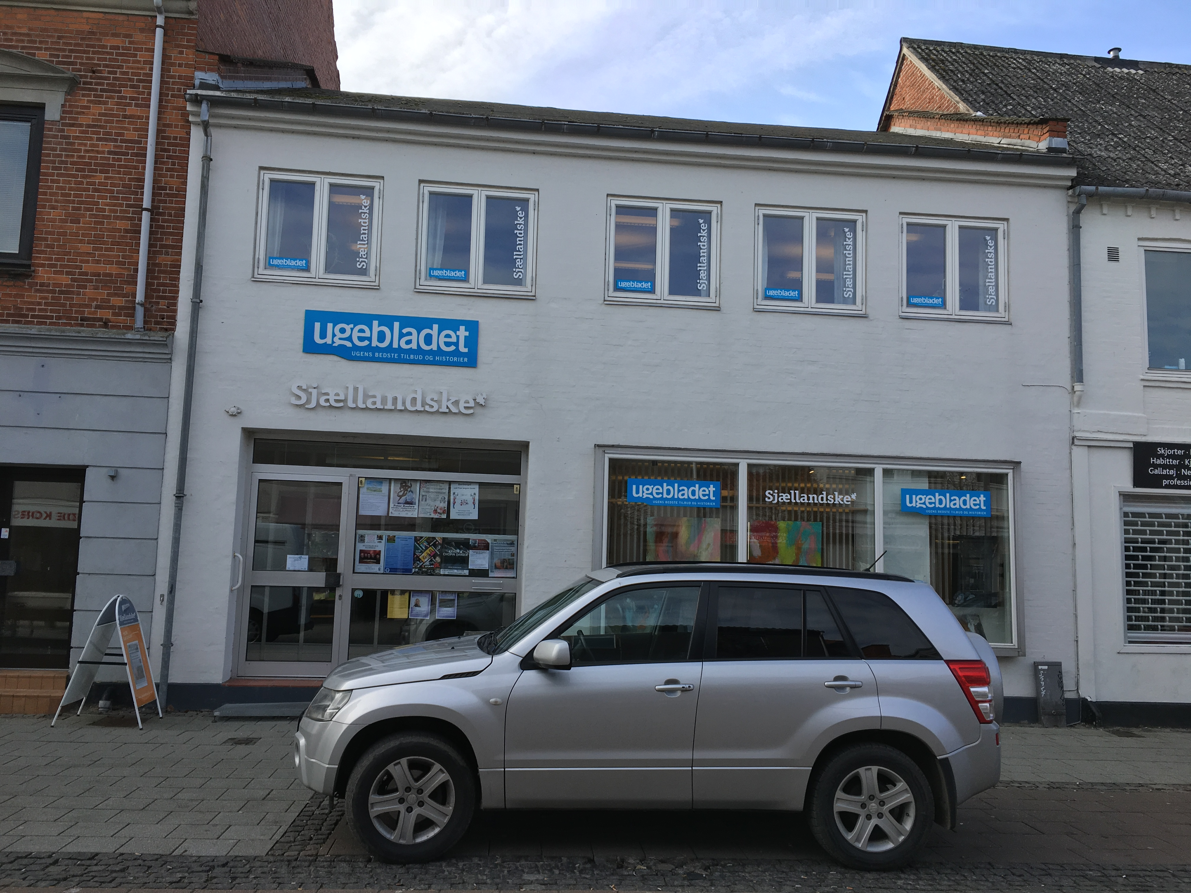 Sjællandske Medier i Vordingborg